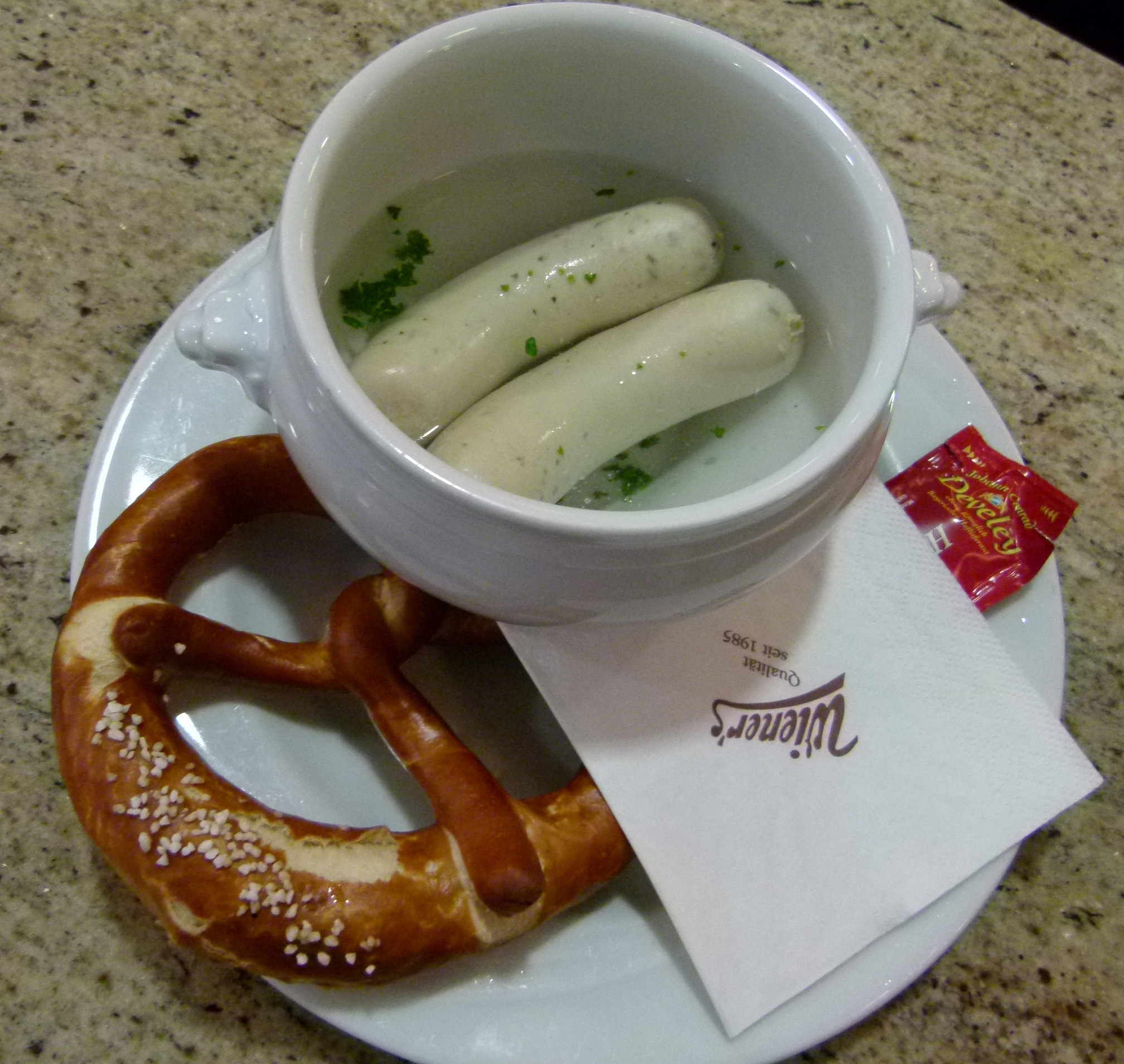 Weißwürste in München